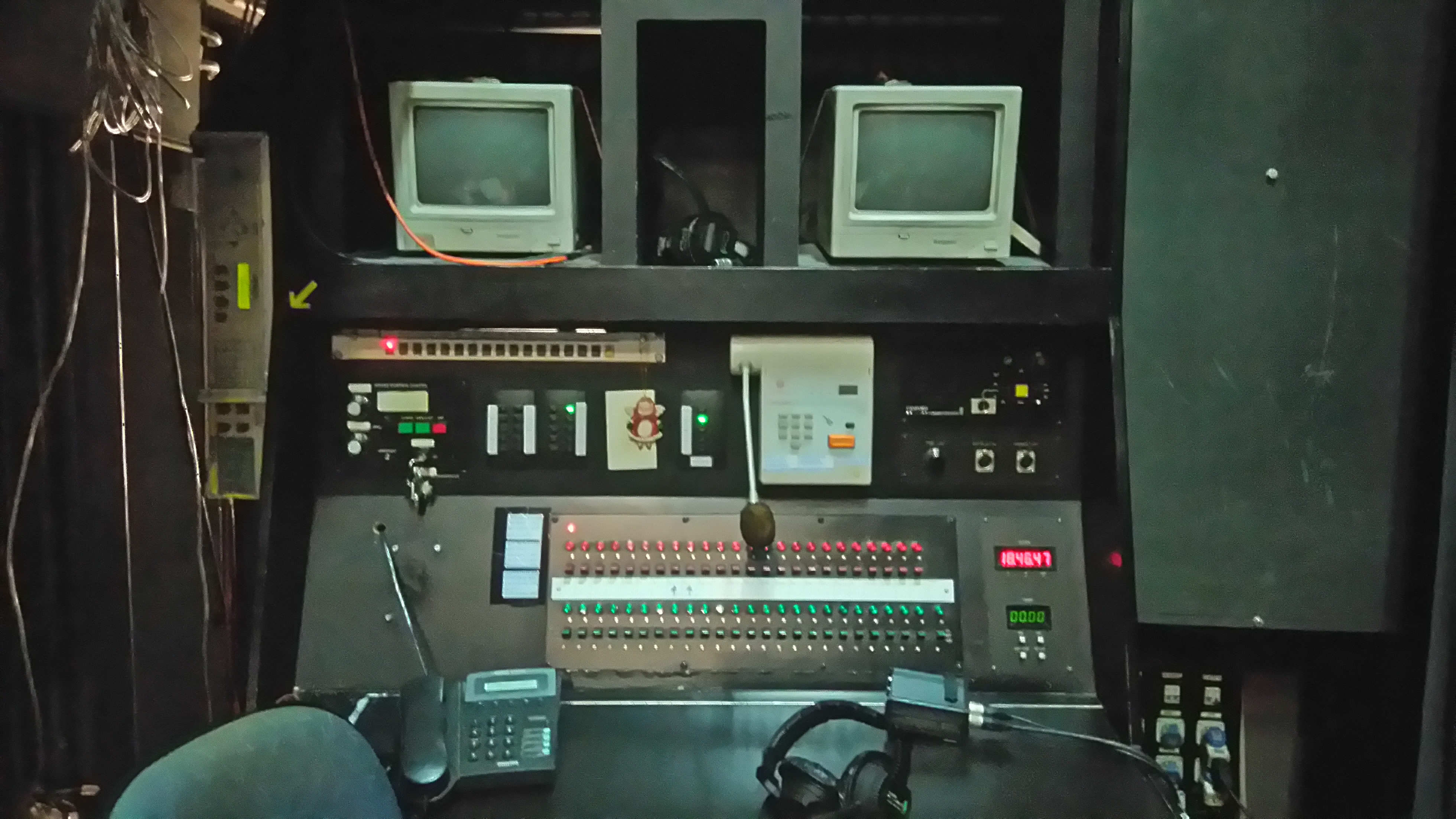 Stage manager desk.